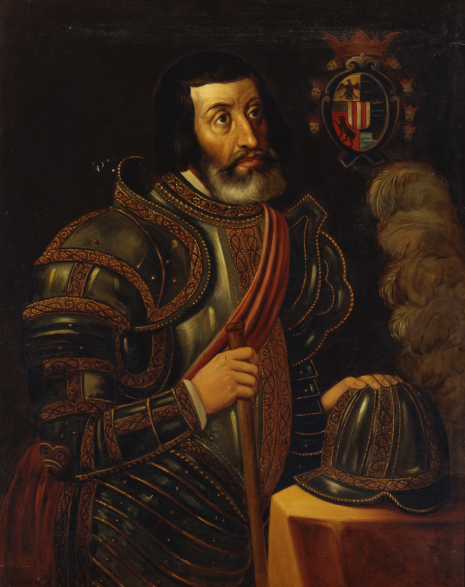 Hernán Cortés (copia). Óleo sobre tela. 109x82 cm